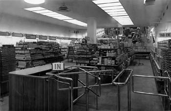 Sveriges första självbetjäningsbutik, Odengaten 31 , Stockholm